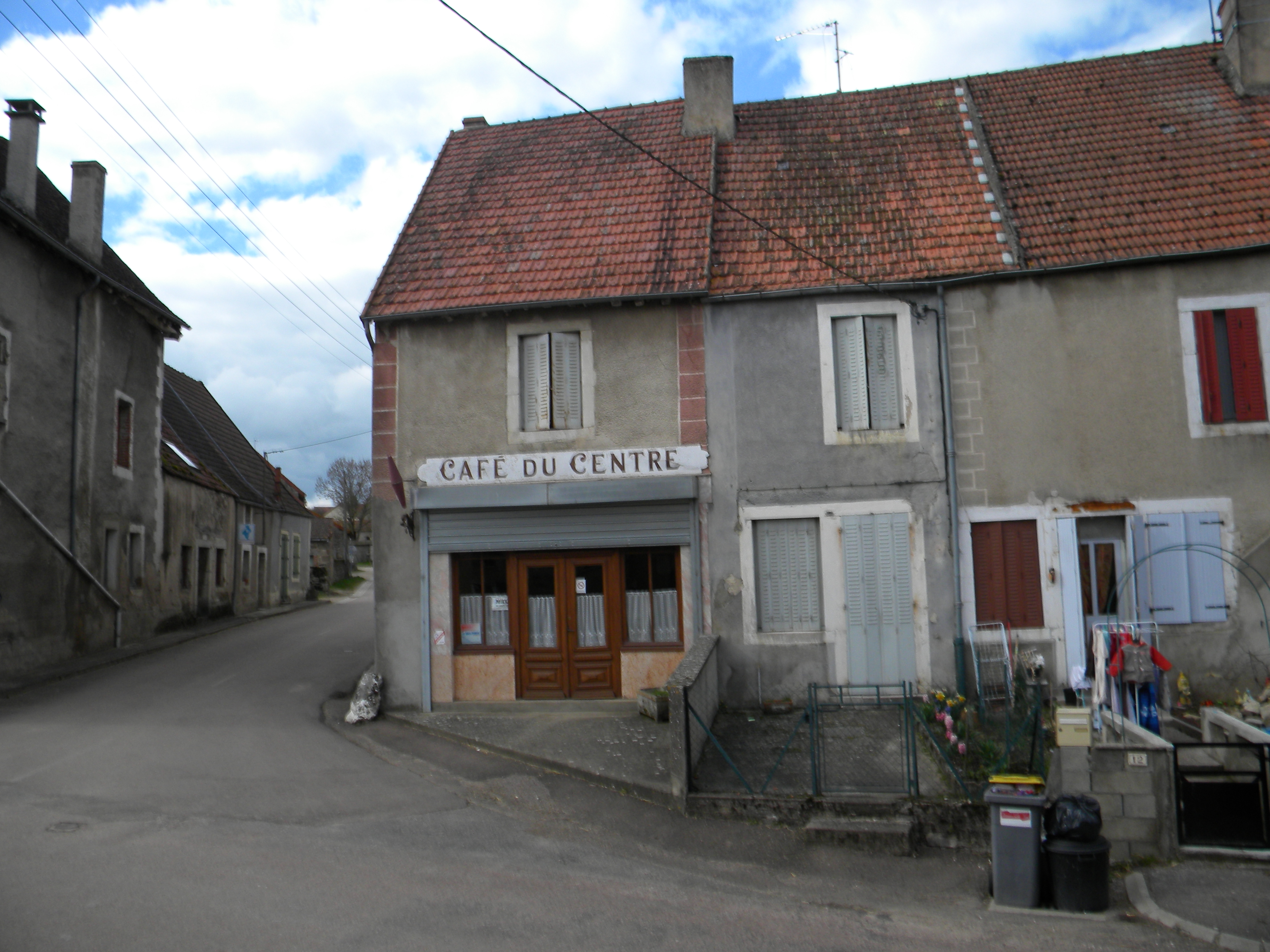 Kafejo de Molinot